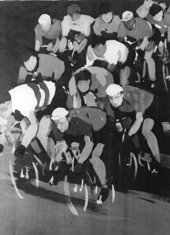 Friedensfahrt, Plakatentwurf Poster of the 14th International Peace Cycle Race Warsaw-Berlin-Prague of "Trybuna Ludu"- "Neues Deutschland" - "Rude Pravo" 2-16.V.1961. CAF-Warsaw.March 1961. Entwurf für Plakat zur 14. internat. Friedensfahrt Warschau-Berlin-Prag der "Trybuna Ludu"- Neues Deutschalnd"-"Rude Pravo"